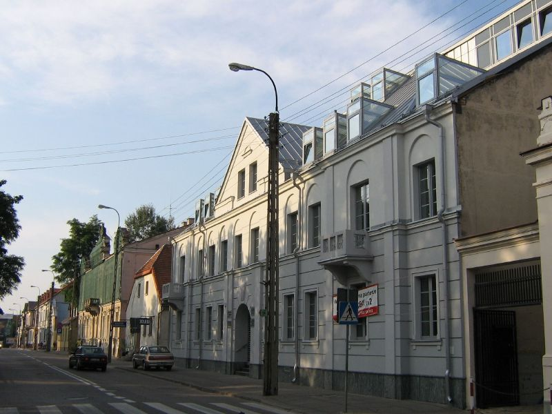 Kamienica przy ul. Warszawskiej w Białymstoku